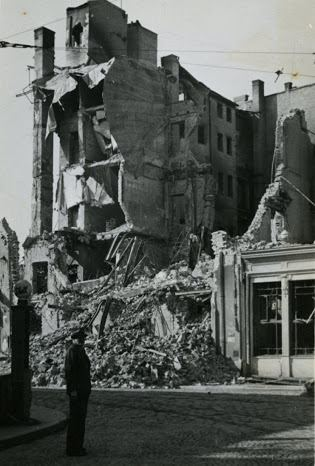 Фотографије бомбардованог Београда 06. 04. 1941. и улазак окупатора у Београд априла 1941.